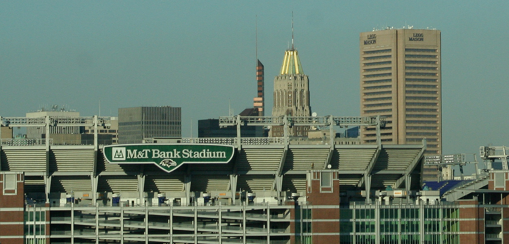 Le M&T Bank Stadium auteur : dbking